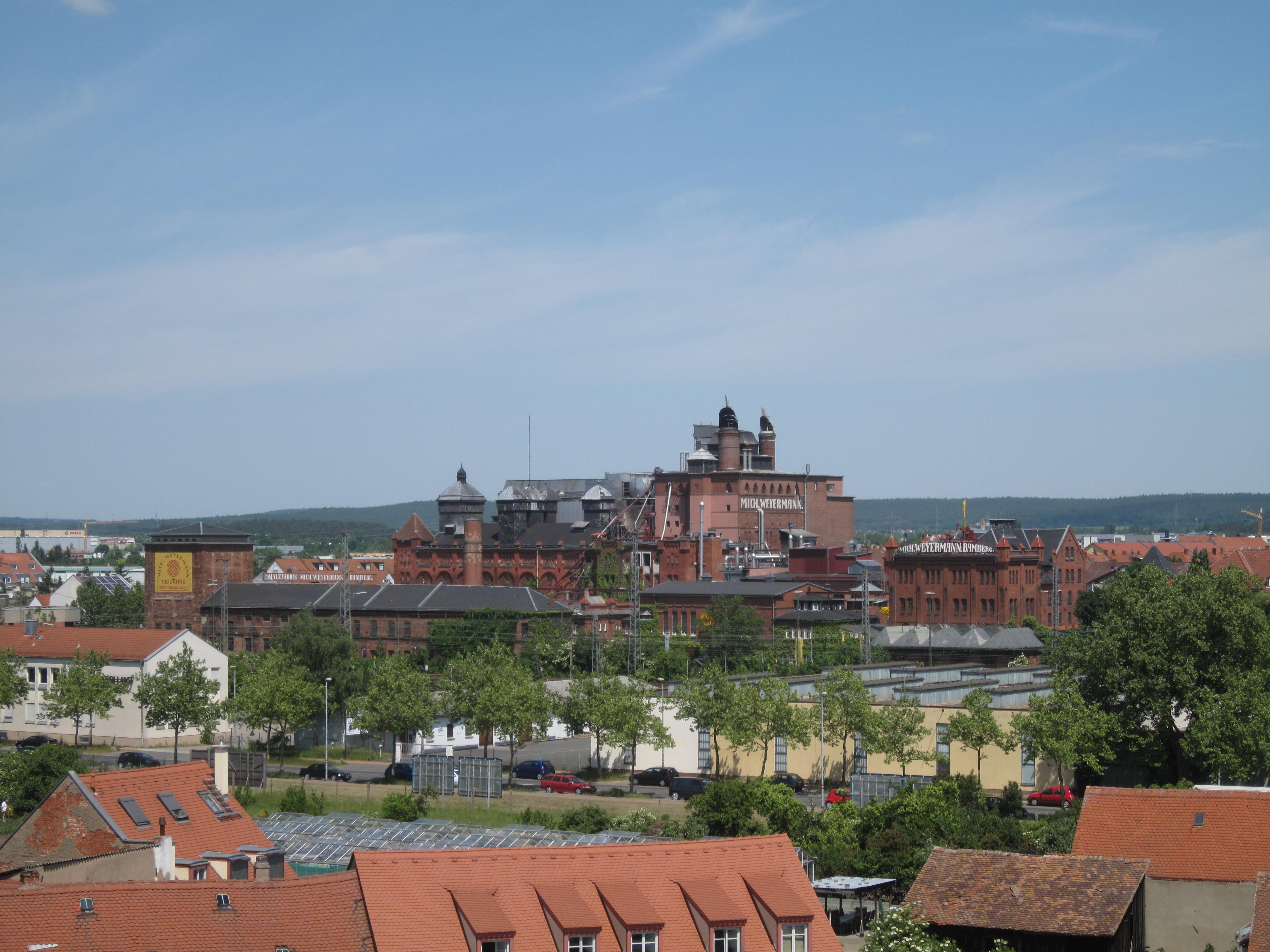 Ansicht der Mälzerei Weyermann in Bamberg